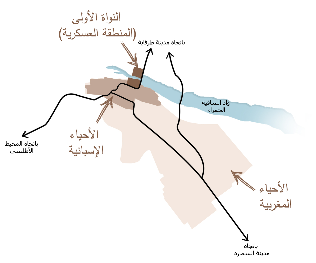 رسم توضيحي لموقع الأحياء التي بنيت في عهد الاستعمار الإسباني في مدينة العيون، المغرب